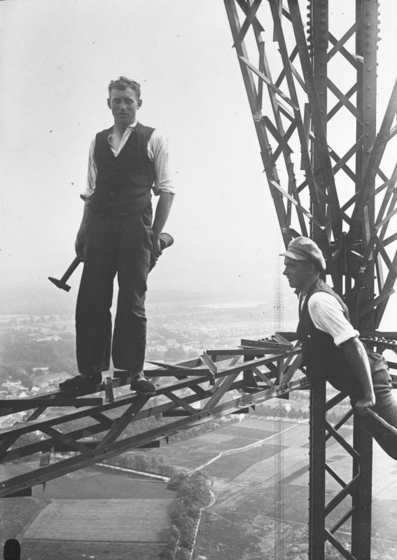 Akrobaten des Alltags! Es gibt Berufe, von denen die wenigsten Menschen sich eine Vorstellung machen können, Berufe, deren Arbeitsfeld in schwindelnder Höhe liegt. Das Leben dieser Menschen hängt an einem Faden, denn ein Fehltritt, ein Schwindelanfall und schon stürzen sie in die Tiefe. Kein rettendes Netz schützt diese Akrobaten des Alltags. In 280 m Höhe, frei ballancierend, prüfen die Arbeiter die Eisenconstruktionen des Funkturmes in Königswusterhausen.